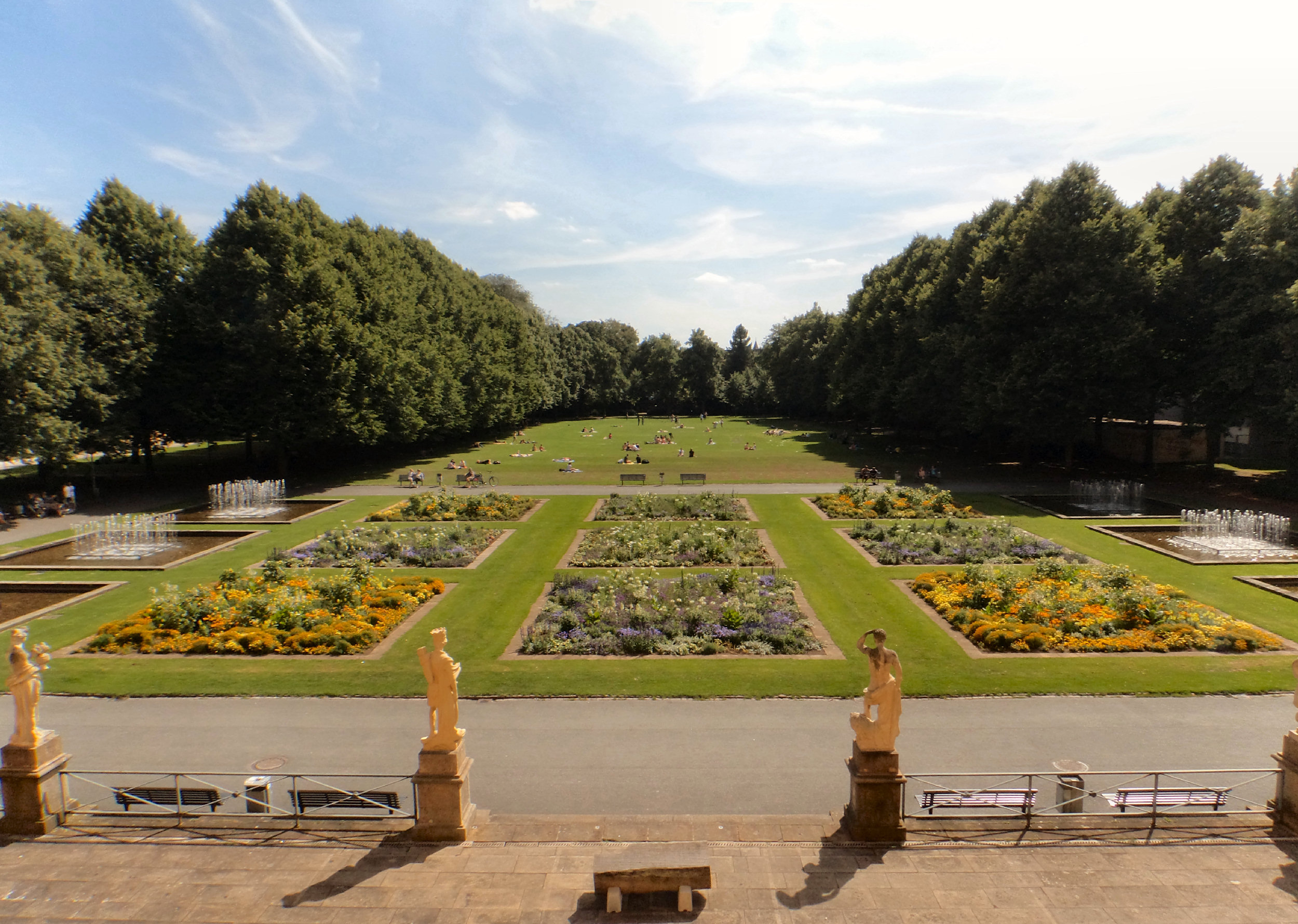 Schloss Osnabrück Schlosspark. Ansicht aus dem Schloss heraus. Universität Osnabrück. UOS. Foto Clemens Ratte-Polle. 2015.08.05. DSC07143